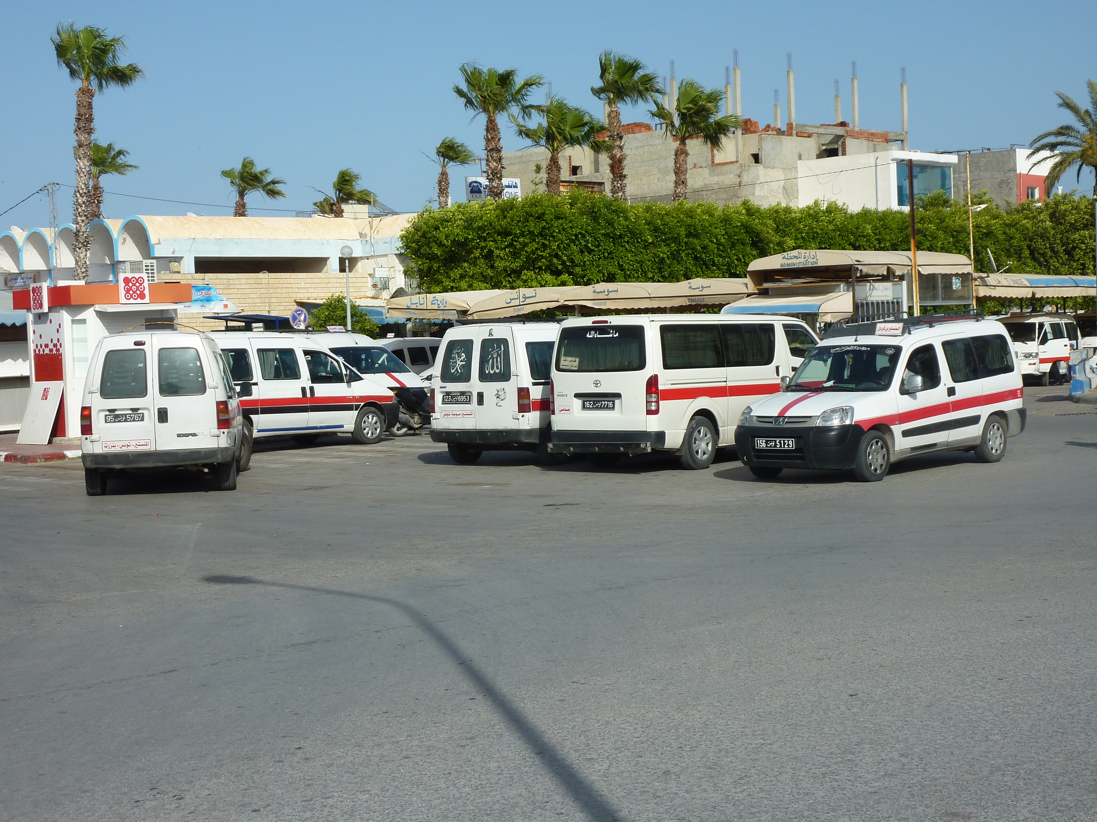 Louages (streektaxis) in Monastir, Tunesien